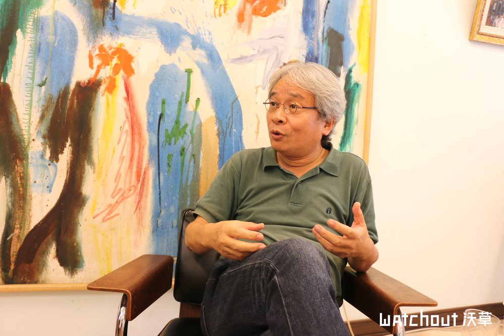 八里、三芝、石門、淡水、泰山、林口立委擬參選人馮光遠